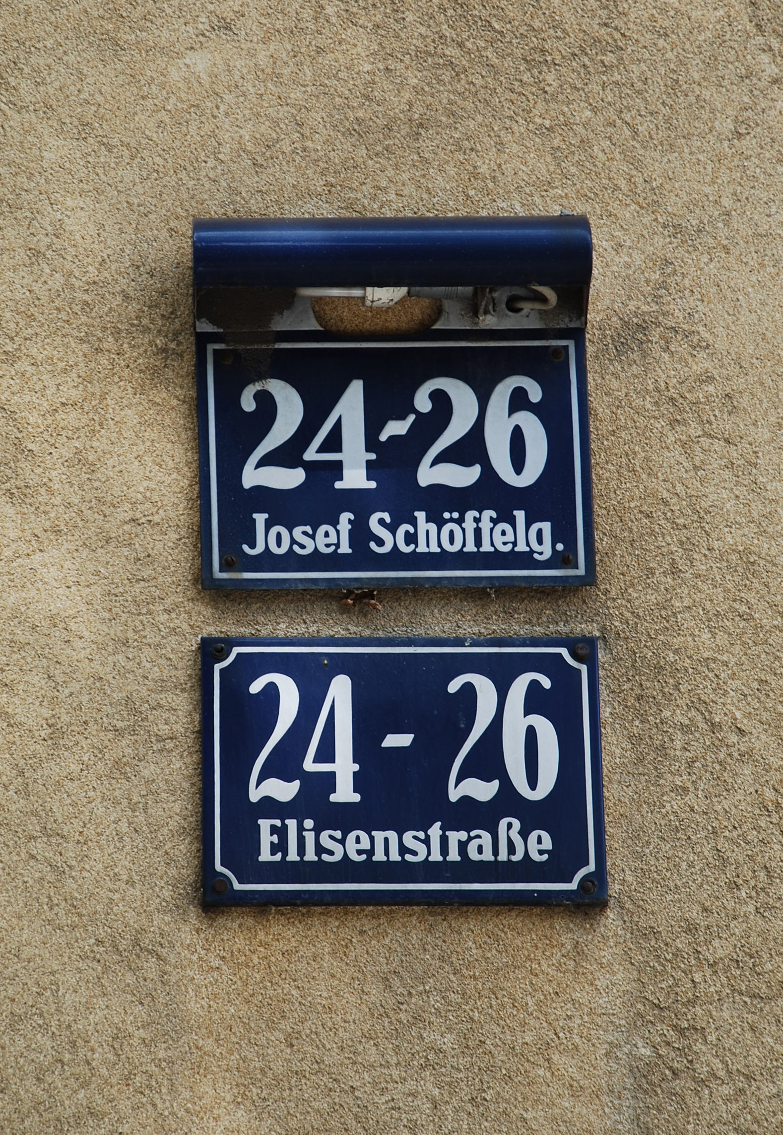 Hausnummernschild Elisenstraße-Schöffelgasse in Wien, Beleg für den früheren Namen der Elisenstraße